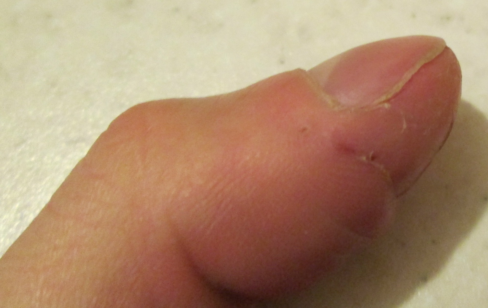 Погрижений великий палець.